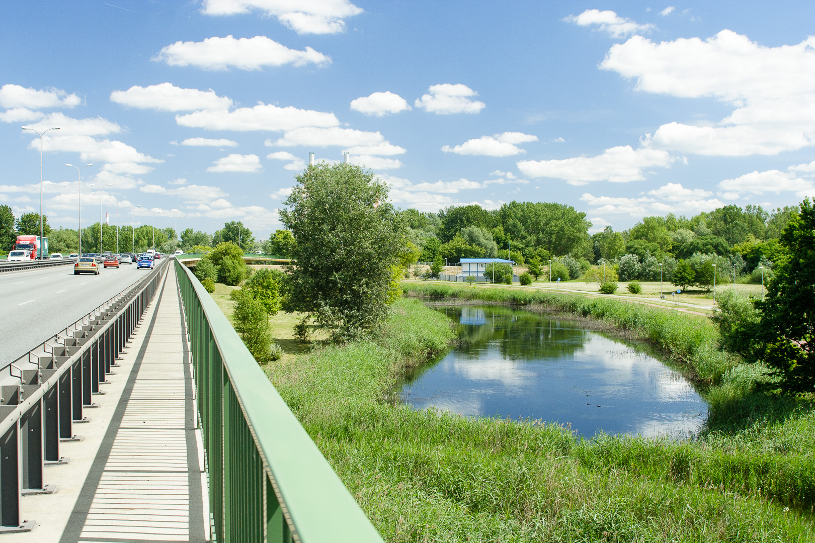 Łacha Siekierkowska cz. wsch., widok z Trasy Siekierkowskiej.